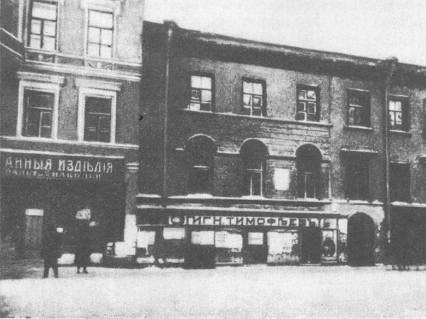 The editors of the journal " Notes of the Fatherland ." 1880s